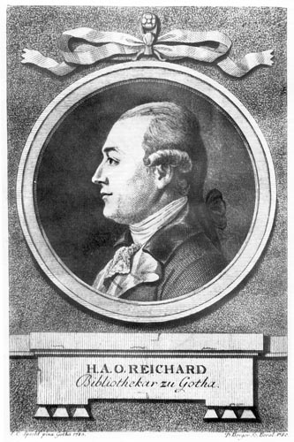 Porträt des Bibliothekars Heinrich August Ottokar Reichard (FB Gotha Goth 2° 187/9)